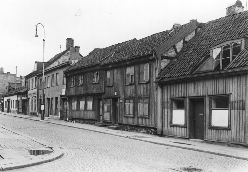 Rødfyllgata ca. 1900